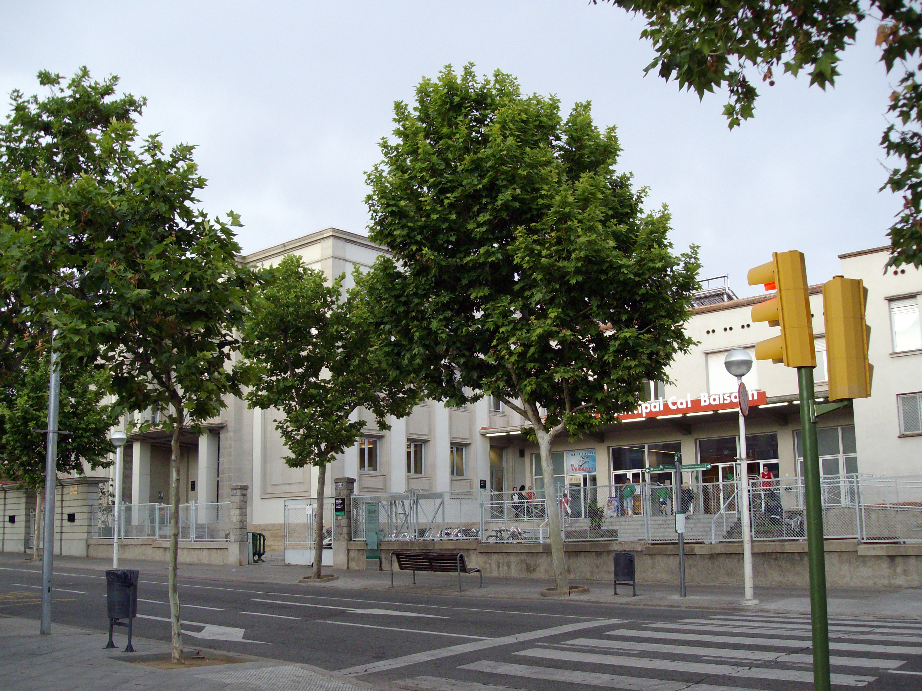 Antigua fábrica de ropa de lana, construida en 1942 bajo proyecto de Gabriel Bracons. Actualmente el edificio acoge un pabellón polideportivo y el Centro Cívico de la Creu Alta. Se encuentra ubicada en la carretera de Prats de Lluçanés, 2-34 (plaza de la Creu Alta), de Sabadell, Barcelona (España).